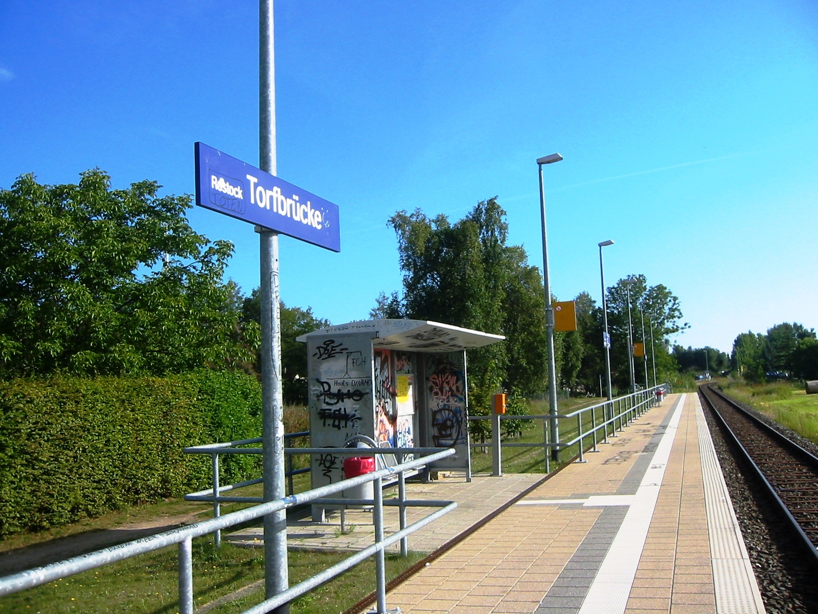 Haltepunkt "Torfbrücke" im gleichnamigen Ortsteil von Rostock. Hier verkehrt eine DB-Linie von Graal-Müritz über Rostock Hbf nach Bad Doberan.